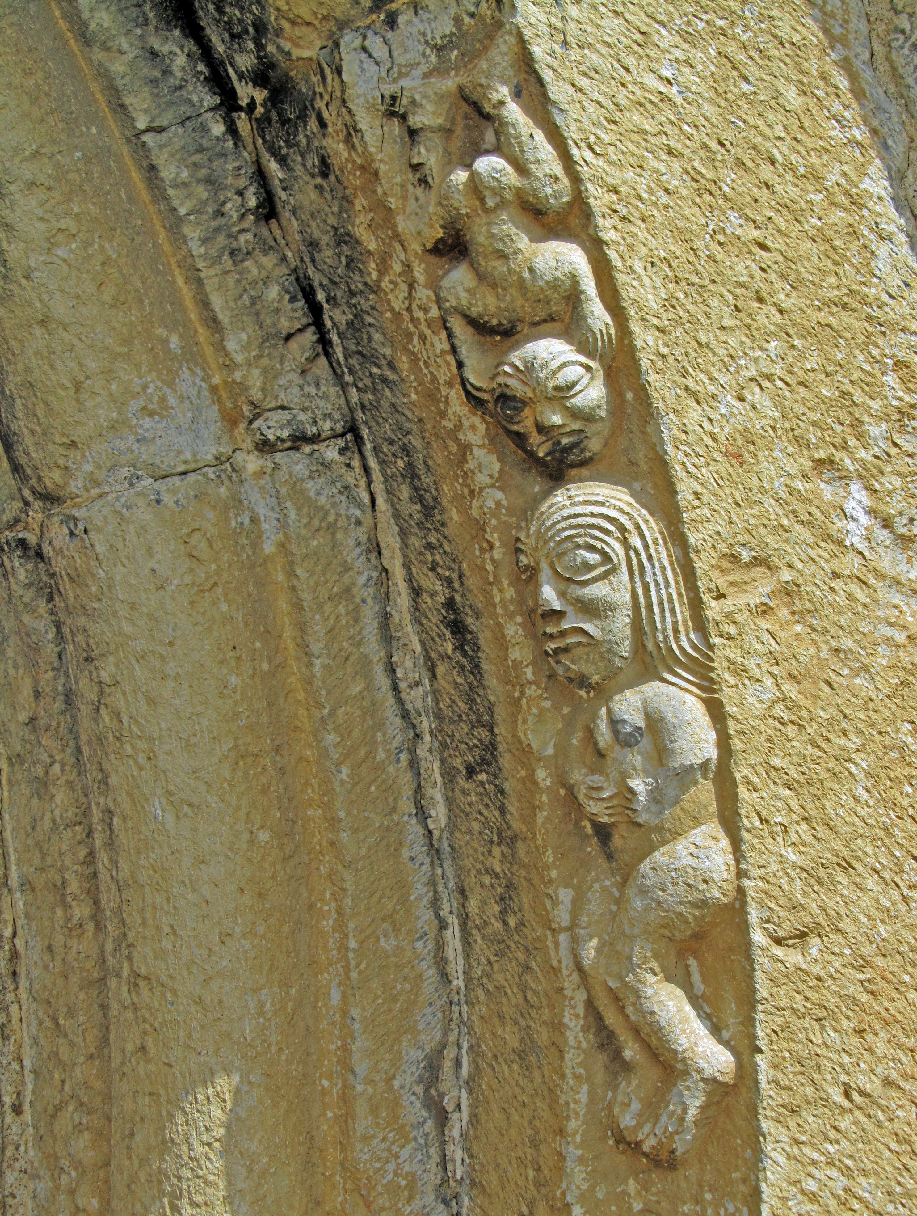 Portada de la iglesia románica de Santa Eugenia de Saga en la Cerdanya Baixa. Cataluña